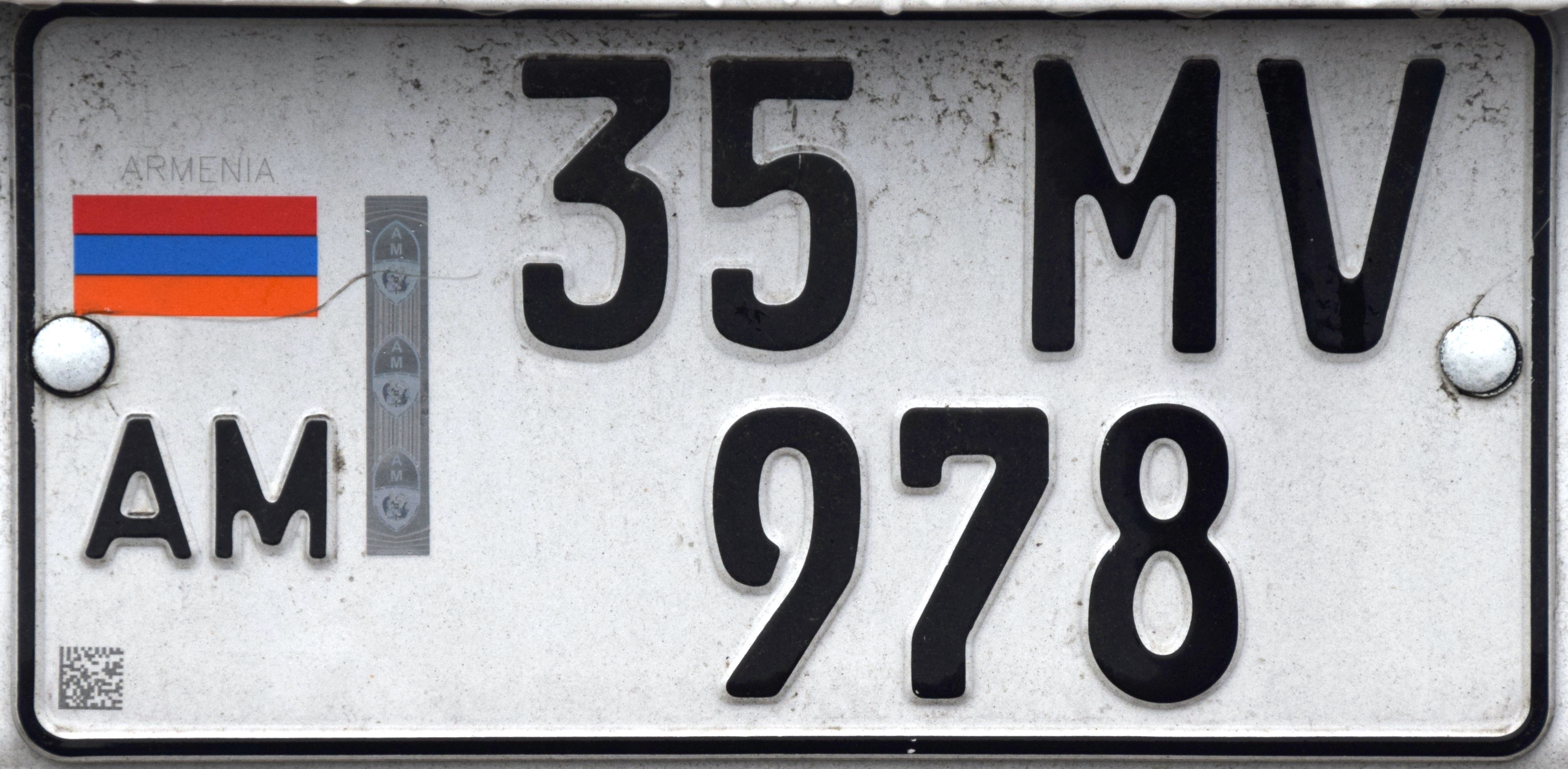 Kentekenplaat uit Armenië